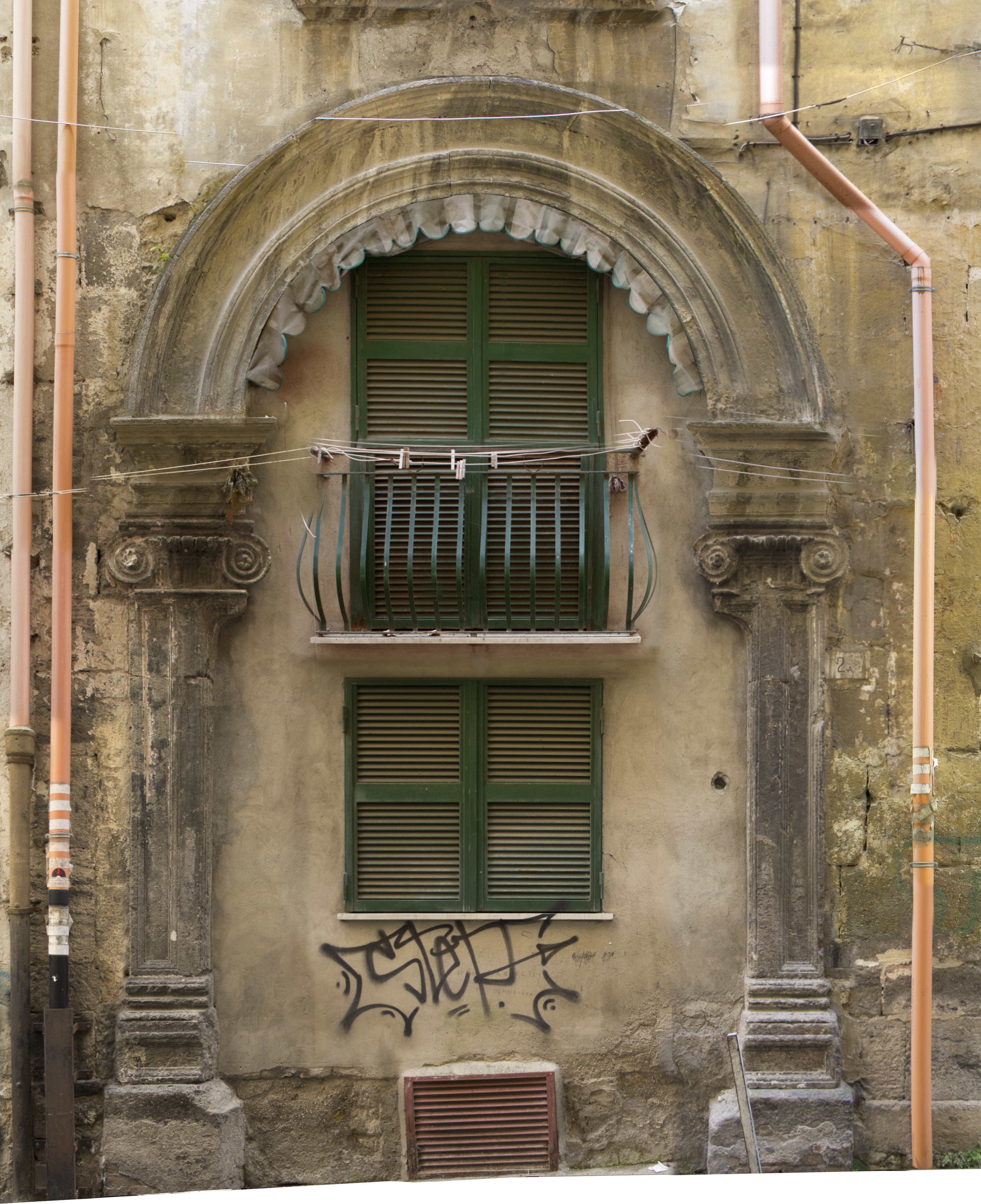 Arco Mormandeo posto su vico II Foglie appartenente al palazzo in via S. Chiara n° 26 Napoli